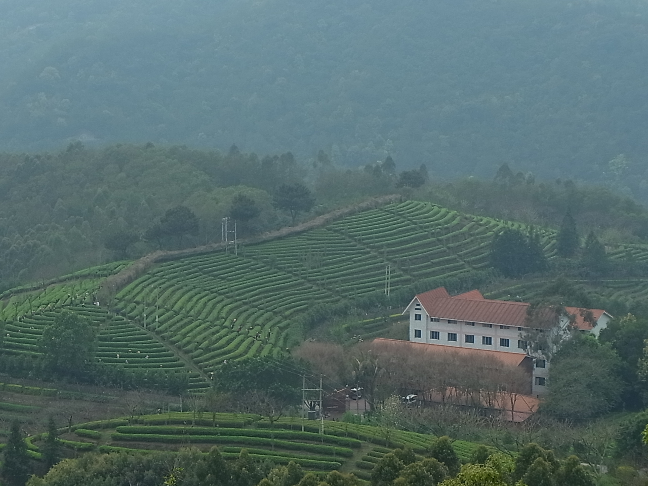 中文（香港）: 梅州一茶田風景